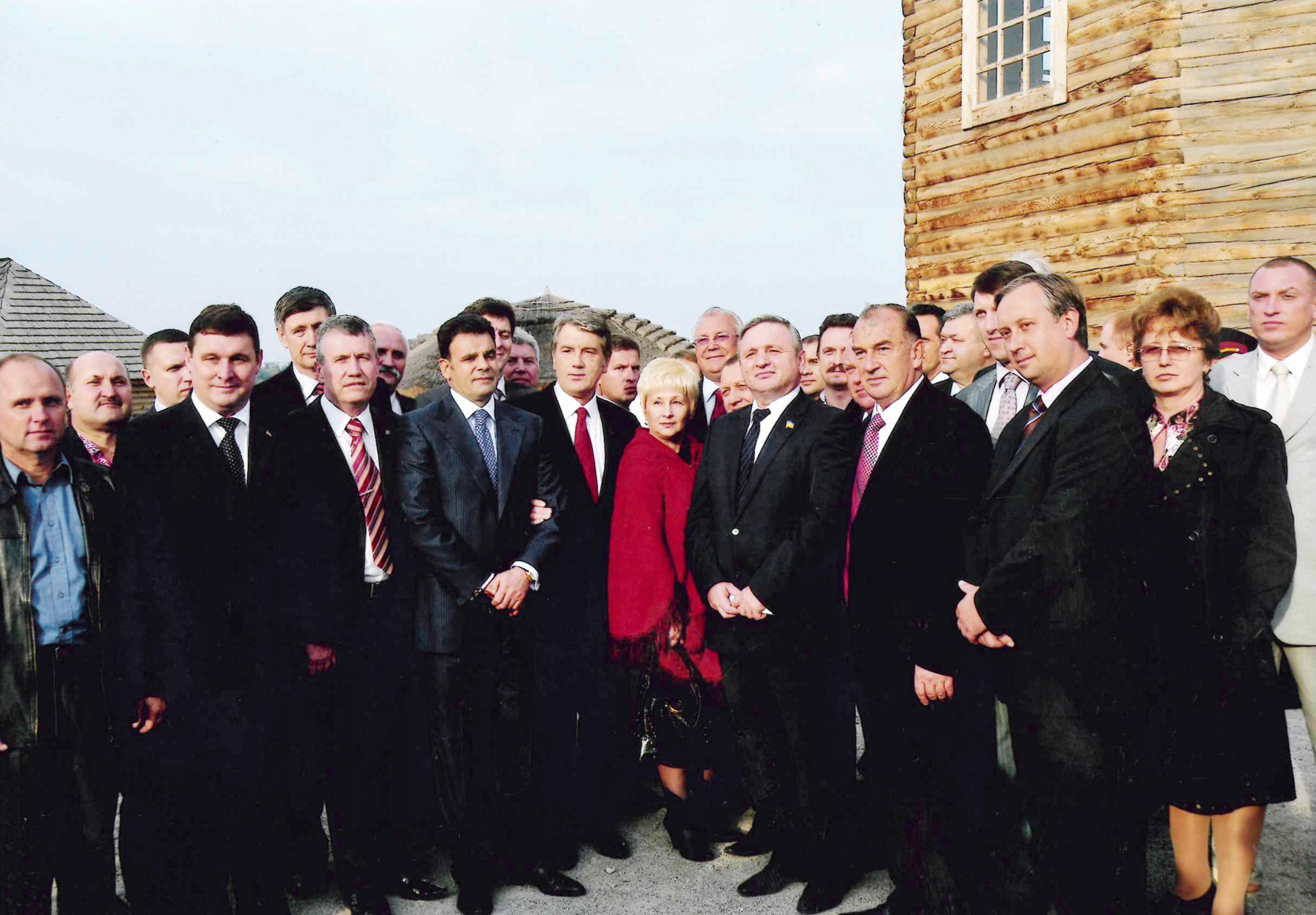 Президент України Віктор Ющенко, місцеве керівництво та меценати будівництва ІКК "Запорізька січ"